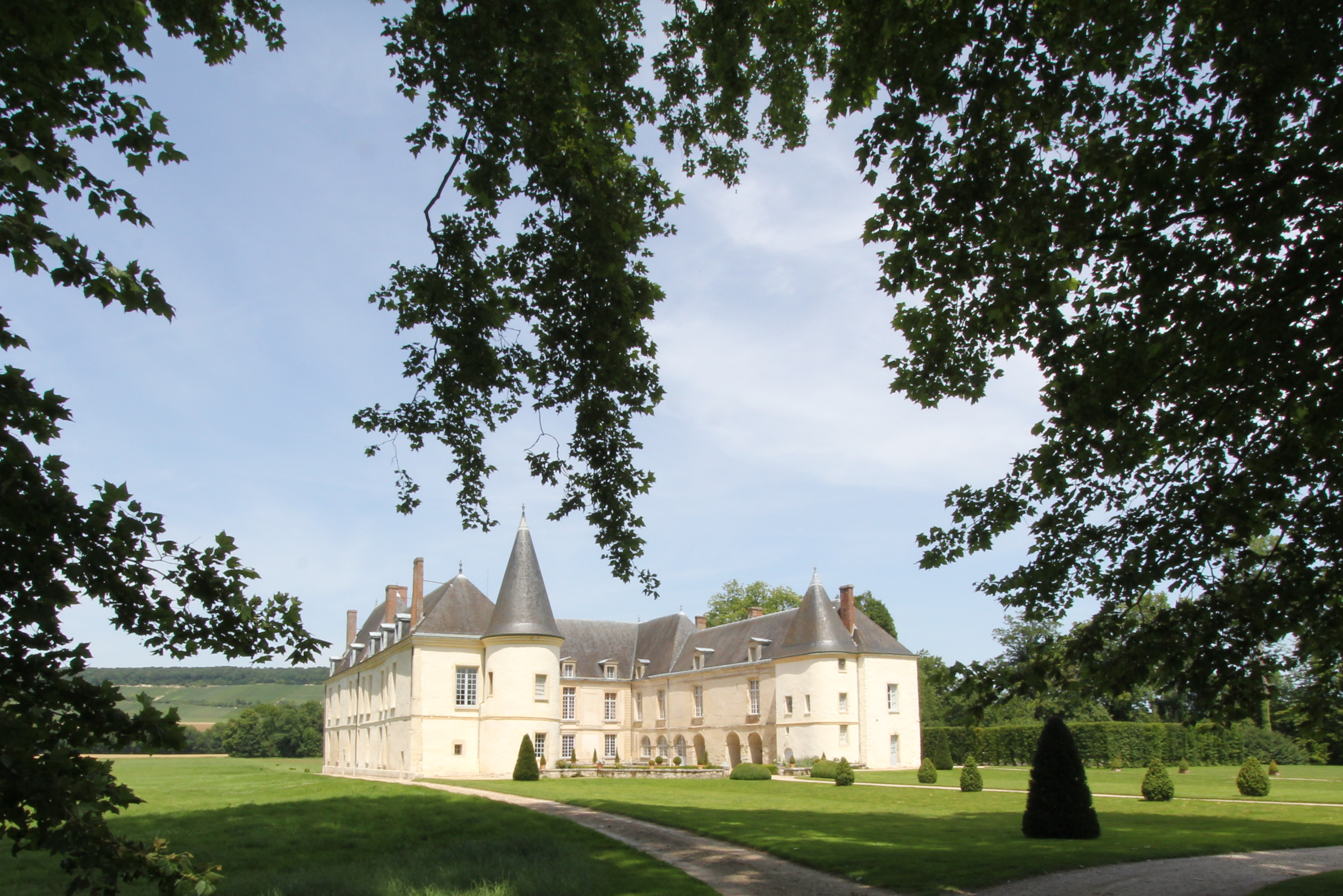 Demeure des Princes de Condé et de Savoie - façade sud sous les frondaisons des platanes tricentenaires. Sur la gauche en arrière plan les coteaux de Champagne (vallée du Surmelin)